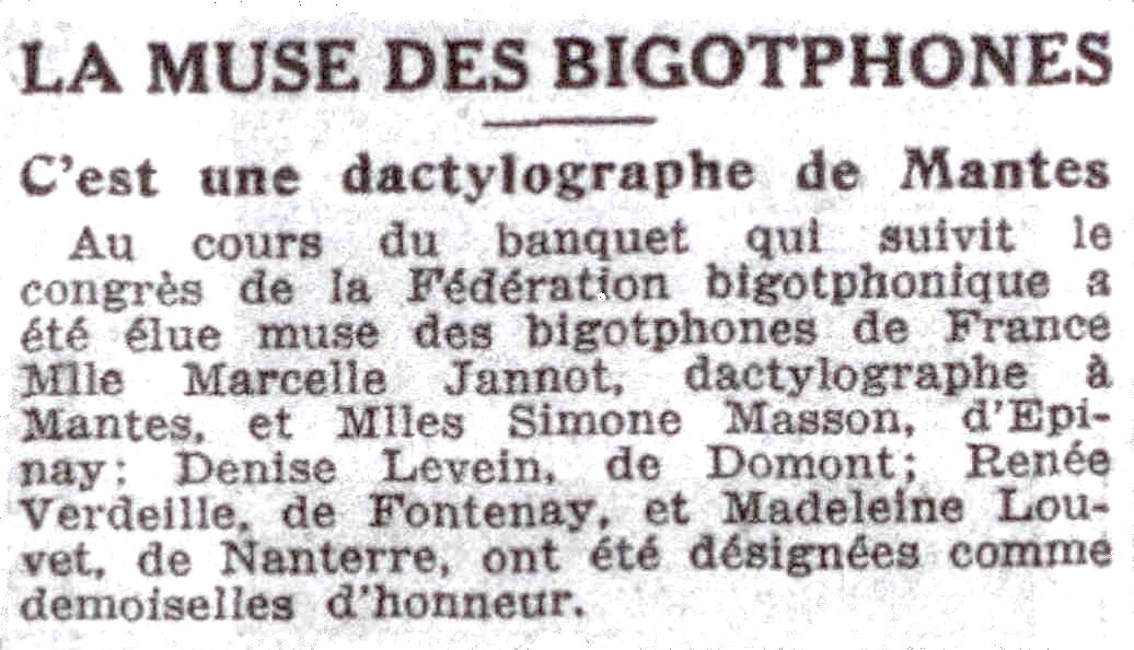 Election de la muse des bigotphones de France 1931.